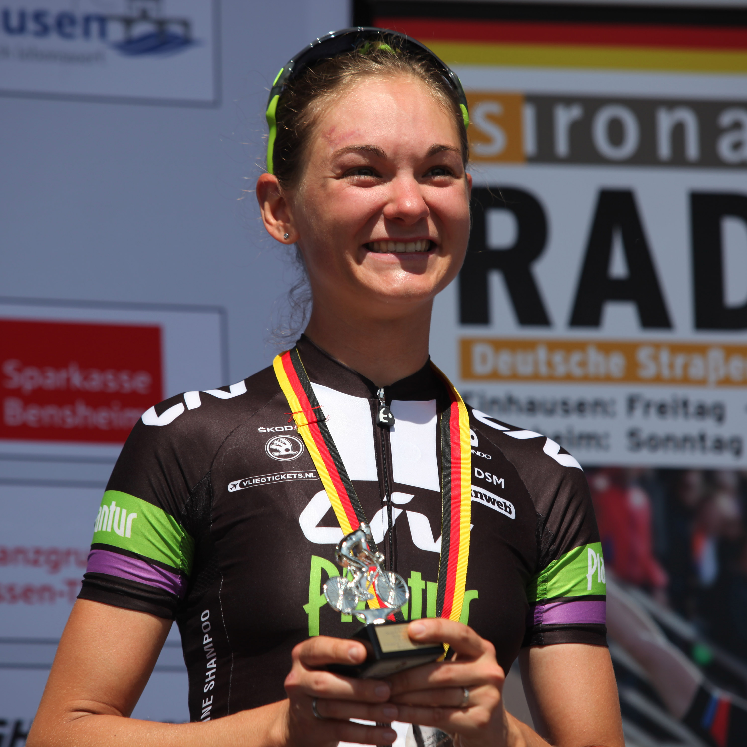 Claudia Lichtenberg bei der Siegerehrung. Foto von den Deutschen Meisterschaften im Straßenrennen der Männer (Elite) am 28. Juni 2015 in Bensheim (Hessen)